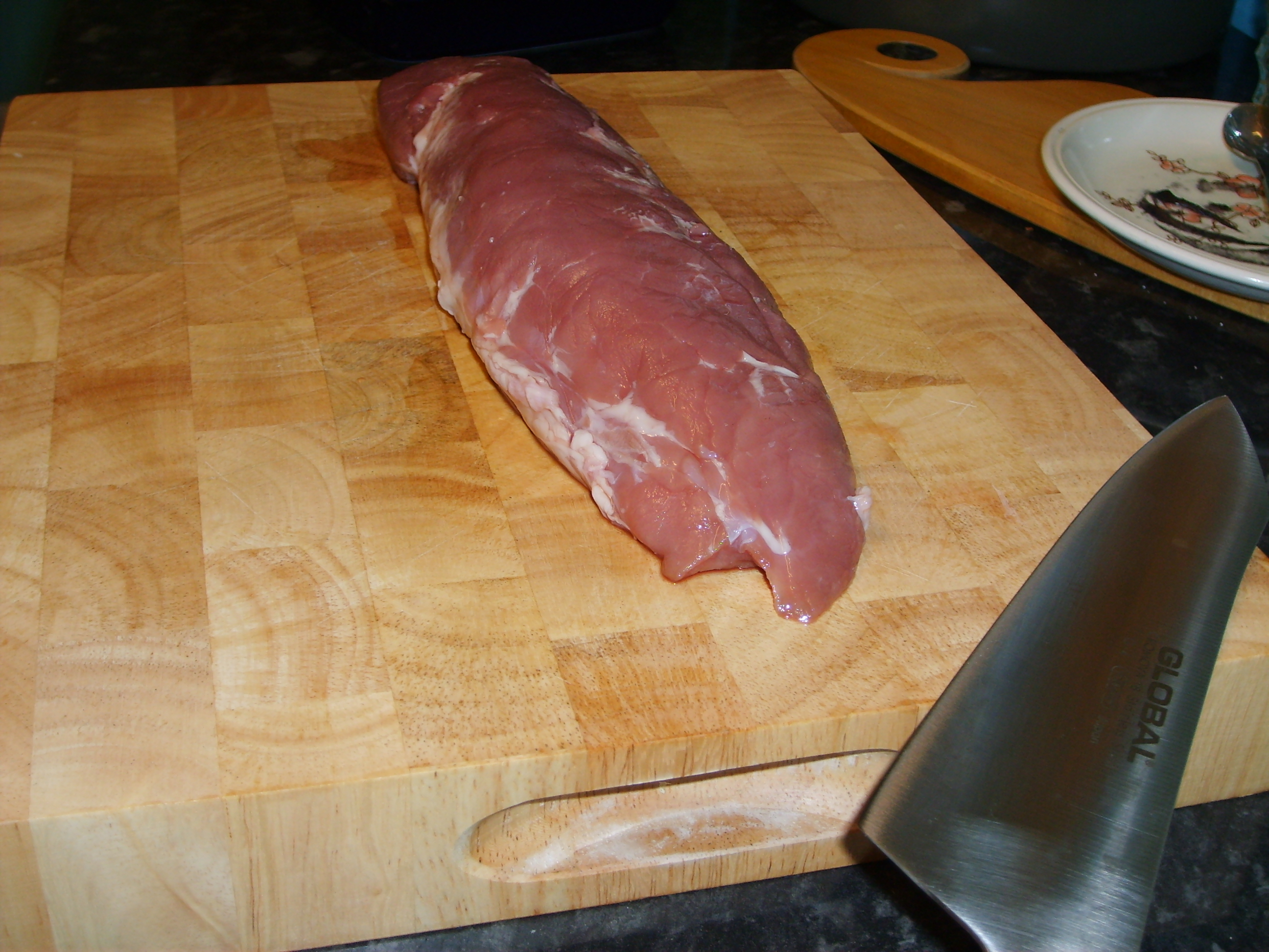 pork loin